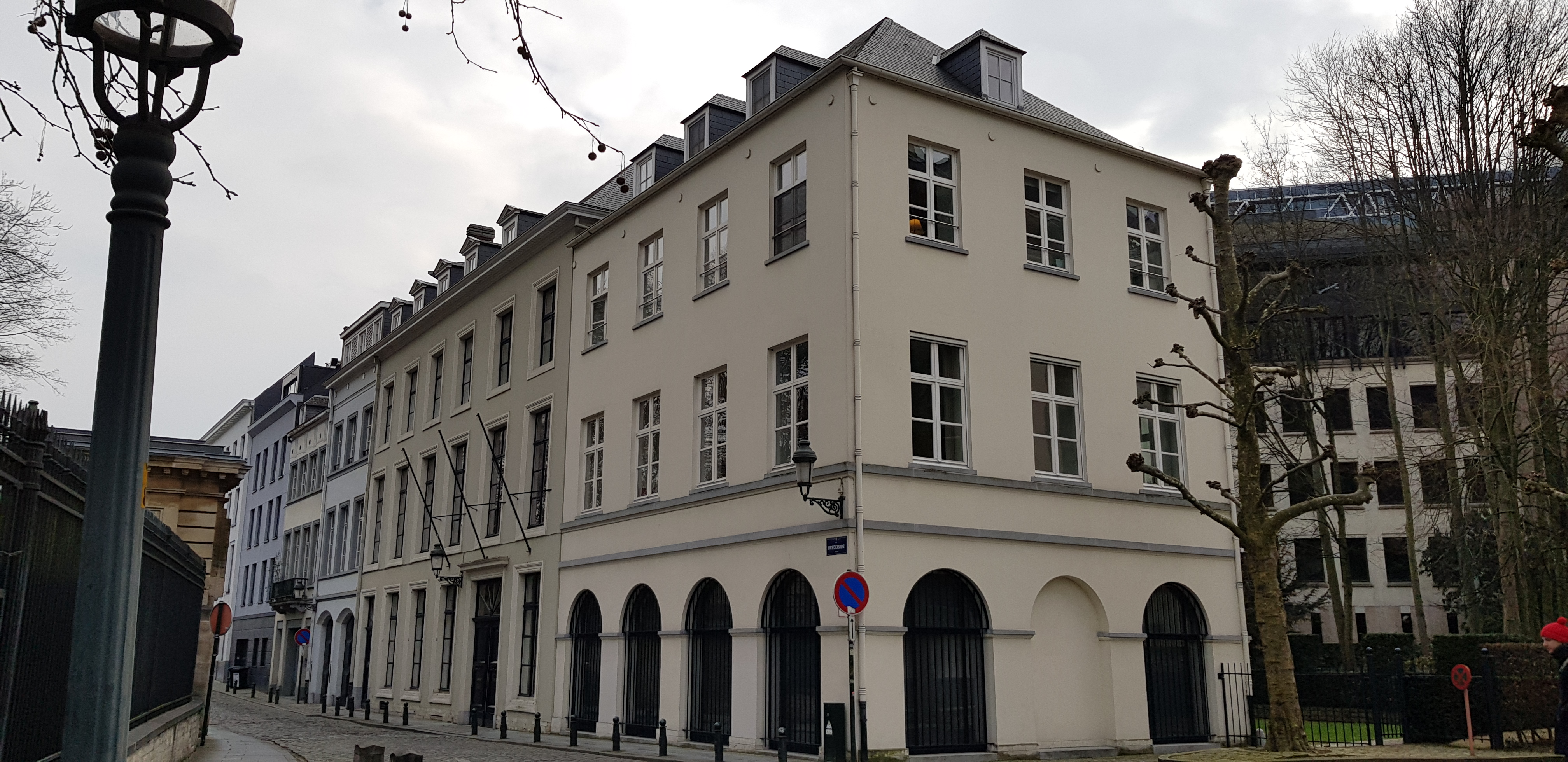 gebouw Koning Boudewijnstichting (Brederodestraat), Brussel, België